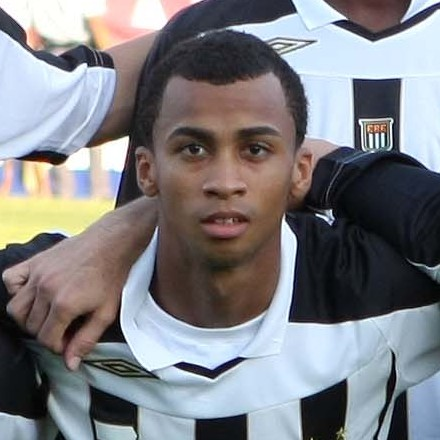 CAMPEONATO PAULISTA 2008 FUTEBOL ESPORTES SETÃOZINHO X SANTOS Time do Santos que iniciou a partida. - ESTÁDIO FREDERICO DALMAZO SERTÃOZINHO/SP BRASIL 01/03/2008 Foto: Junior Faria/GazetaPress código da foto